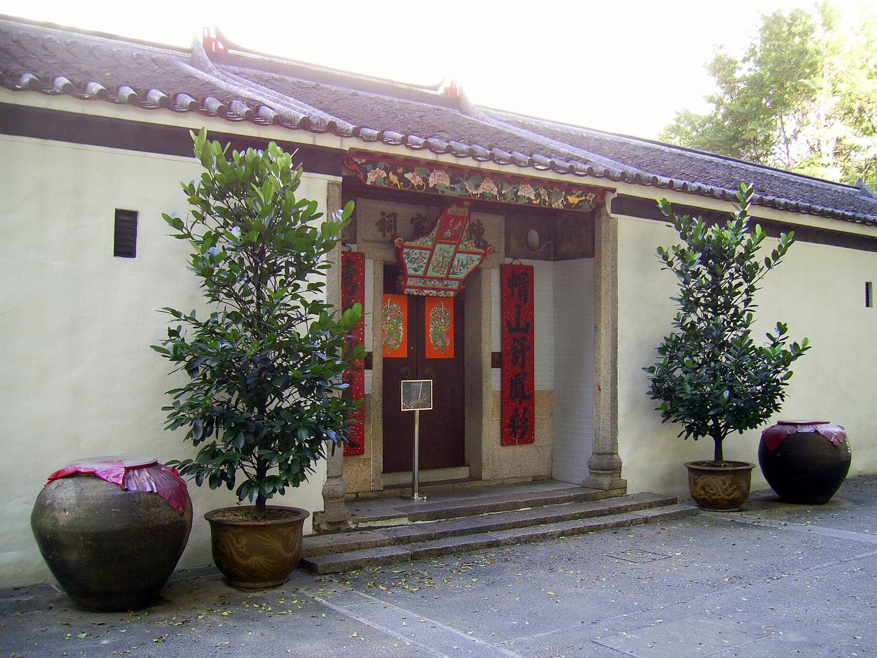 中文（香港）: 三棟屋博物館